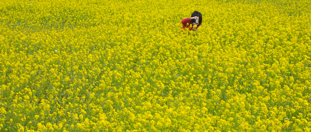 這裡已經到台中囉！！是在大甲的朋友家附近拍的...因為不是在大馬路上，所以整片油菜花田保留的相當完整。